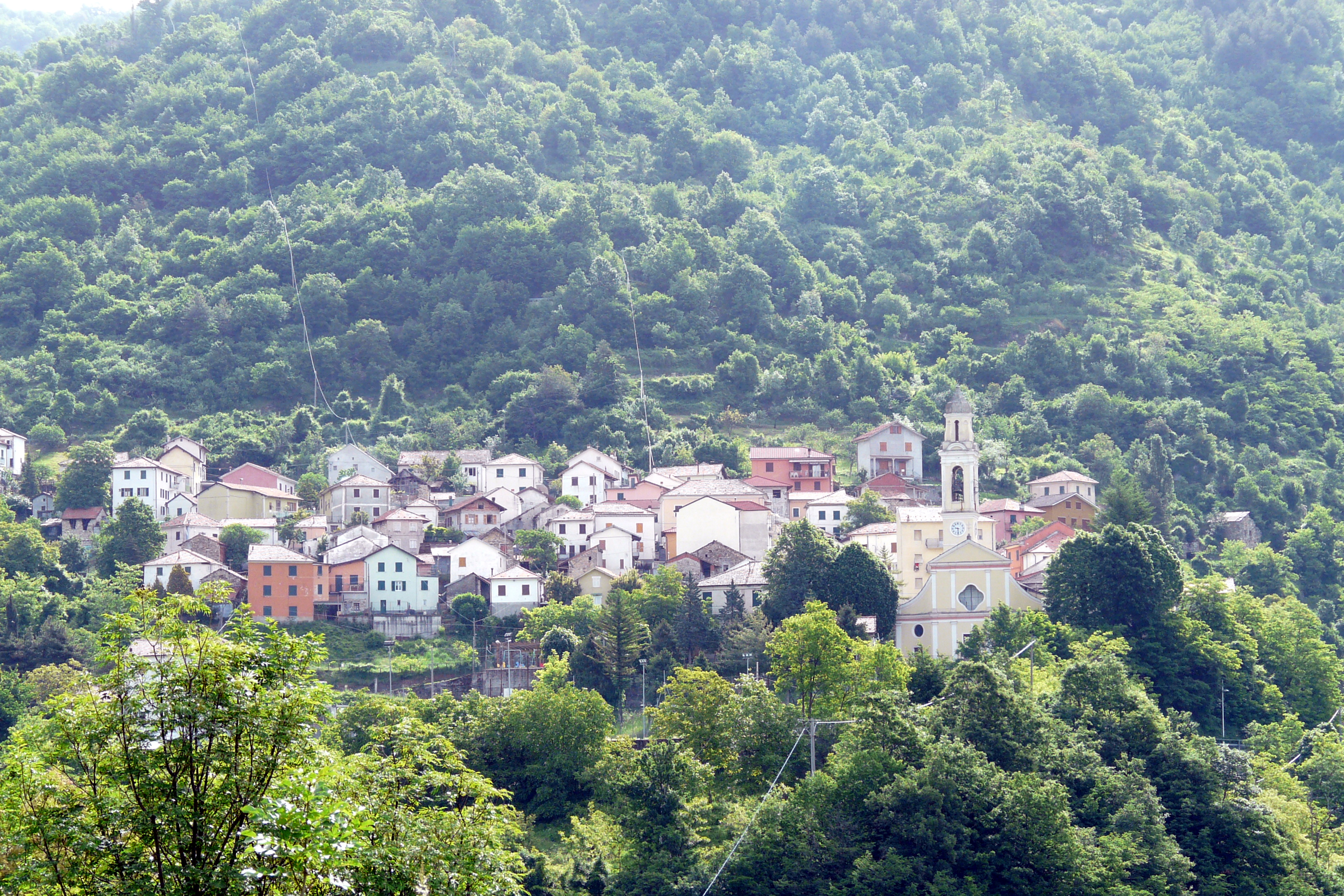 Panorama della frazione di Vallenzona, Vobbia, Liguria, Italia